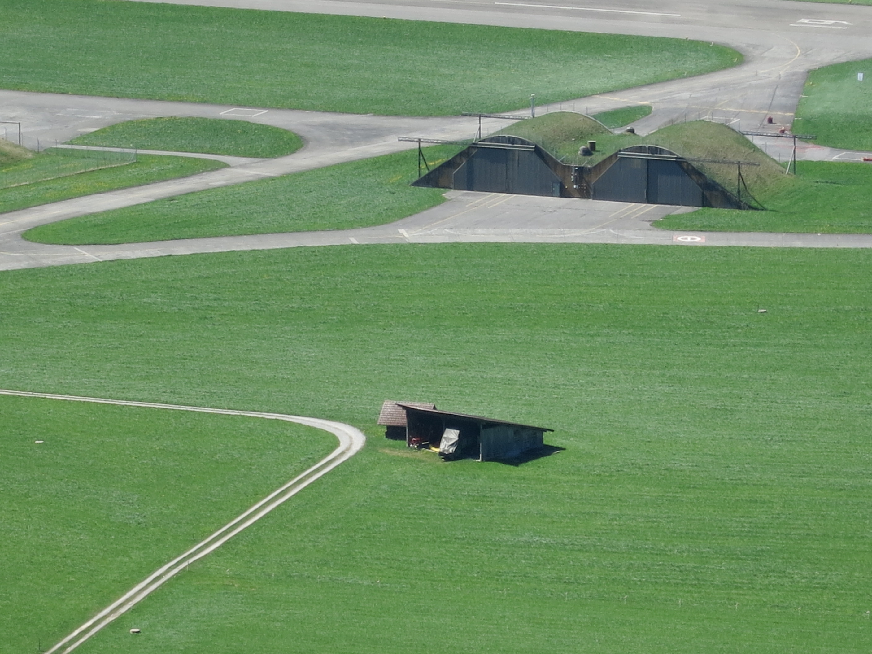 Flugplatz Alpnach OW, Schweiz